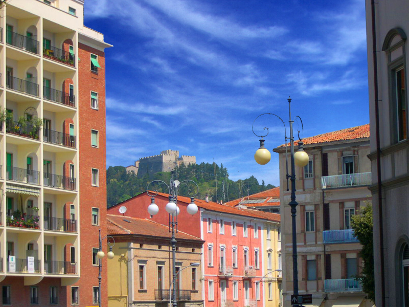 Scorcio panoramico della città di Campobasso da Piazza della Vittoria foto realizzata da E. Minardi(Emmin)